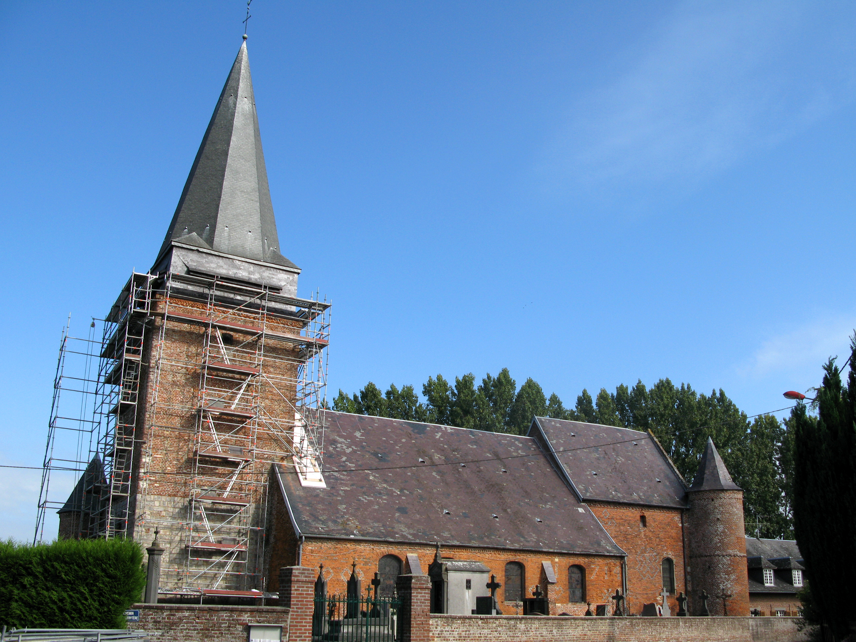 Lavaqueresse (Aisne, France) - L'église fortifiée, dont le clocher est en cours de restauration en septembre 2007 (photo prise lors des «Journées européennes du patrimoine»). Les échafaudages entourant le clocher, les matériaux déposés devant et à l'intérieur du cimetière ont rendu impossibles certaines photos ou des angles de vue particuliers.